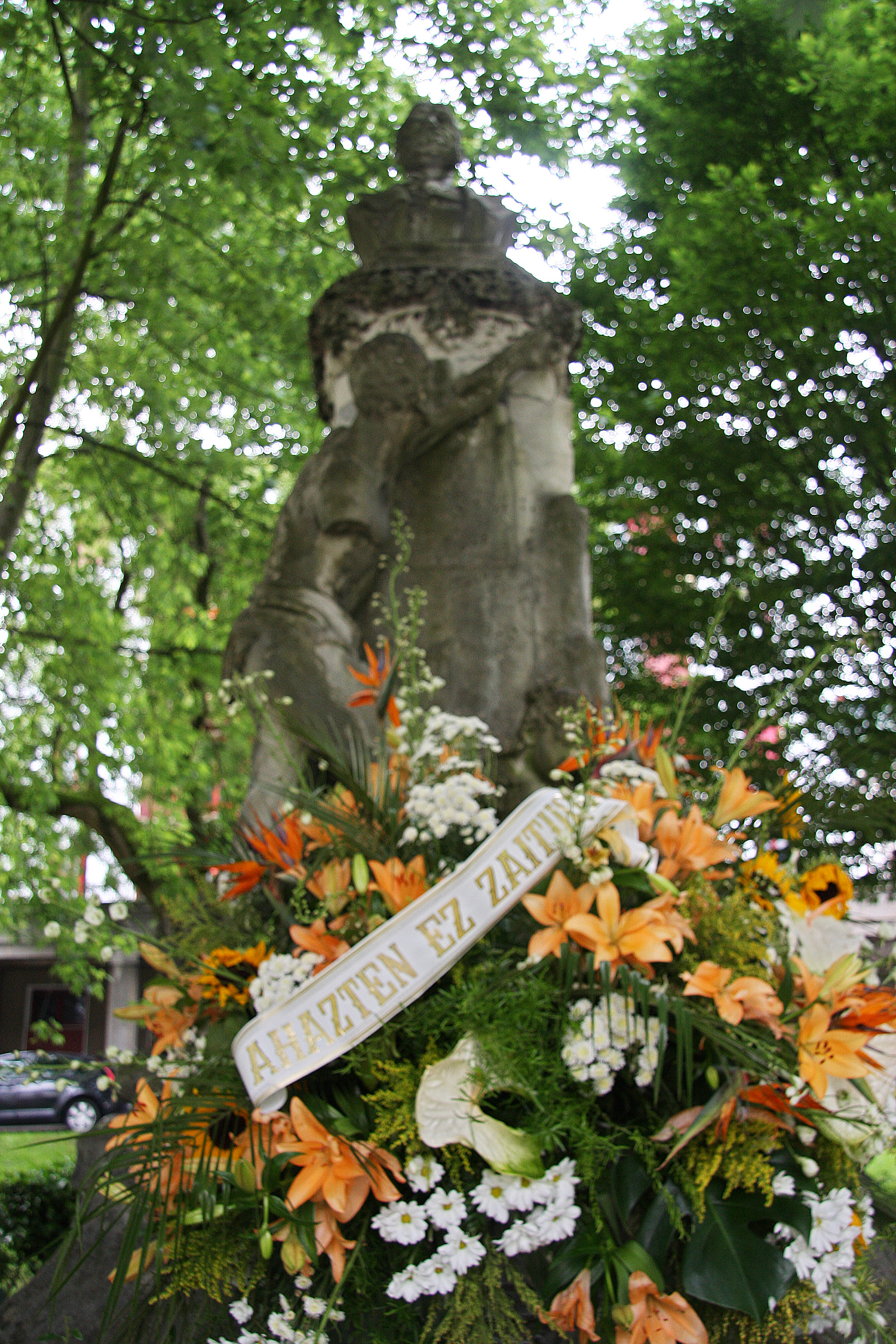 Pedro Biteri eta Aranaren omenezko monumentuan lore eskaintza.